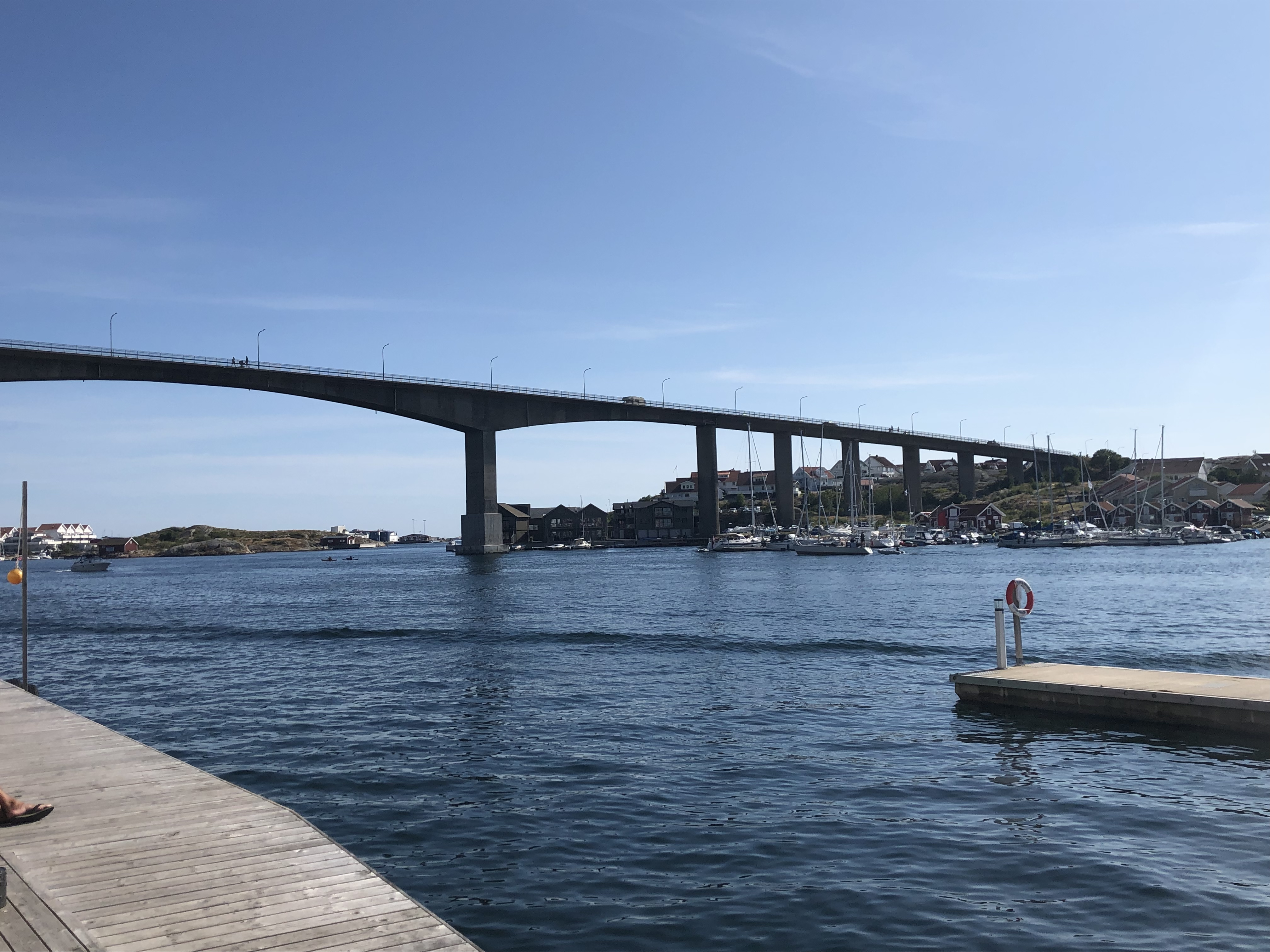 Smögenbron sedd från Kungshamn 2019. Foto: Johan Rosén